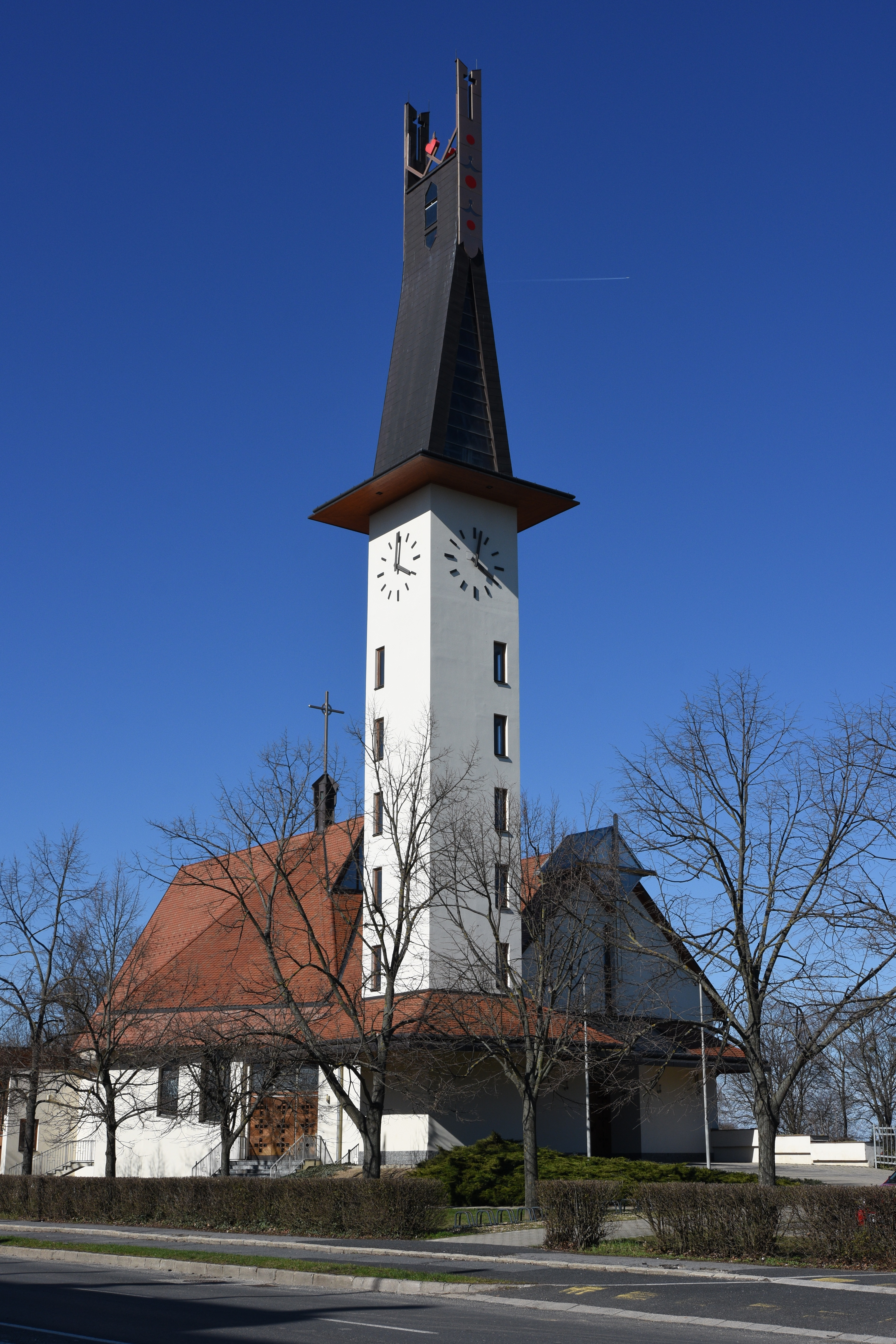 Churches in Szombathely